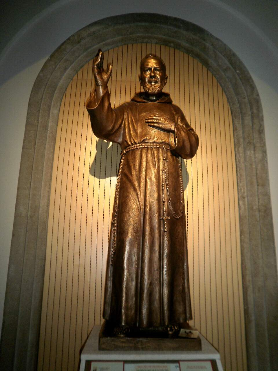 Iglesia de San Antonio (PP Capuchinos), en Pamplona